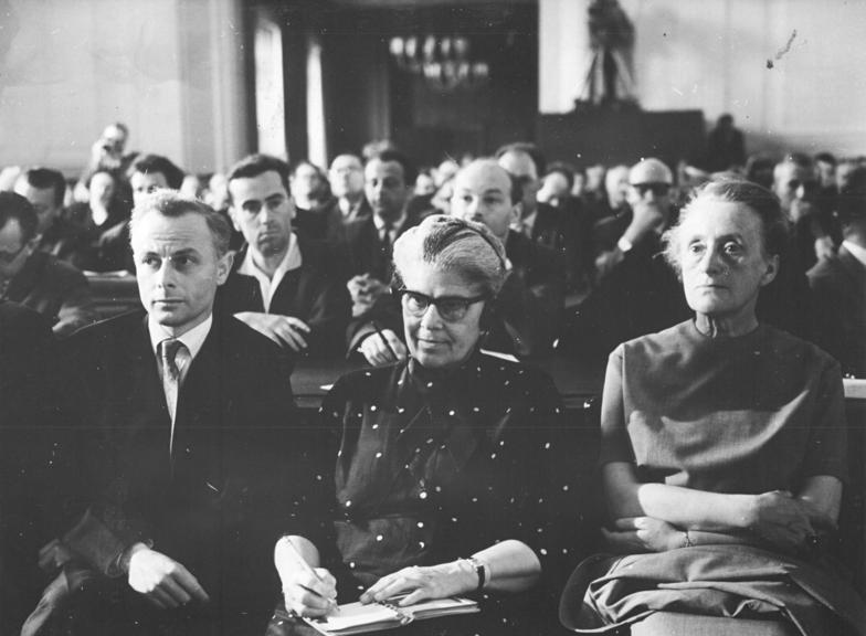 Oberstes Gericht, Globke-Prozess, Publikum